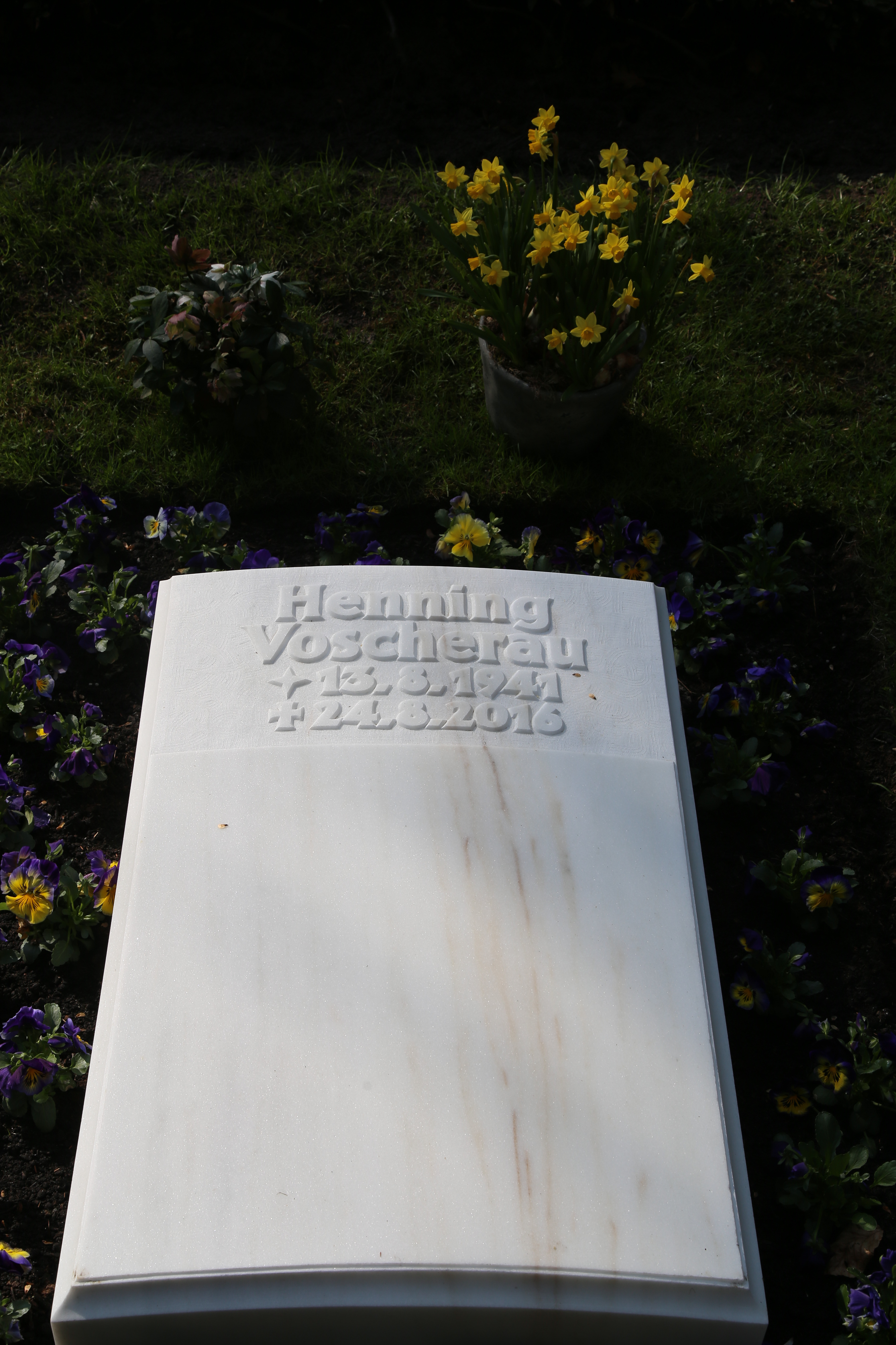 Henning Voscherau (* 13. August 1941 in Hamburg; † 24. August 2016 ebenda) war ein deutscher Politiker der SPD. Der Jurist war von 1988 bis 1997 Erster Bürgermeister der Freien und Hansestadt Hamburg.